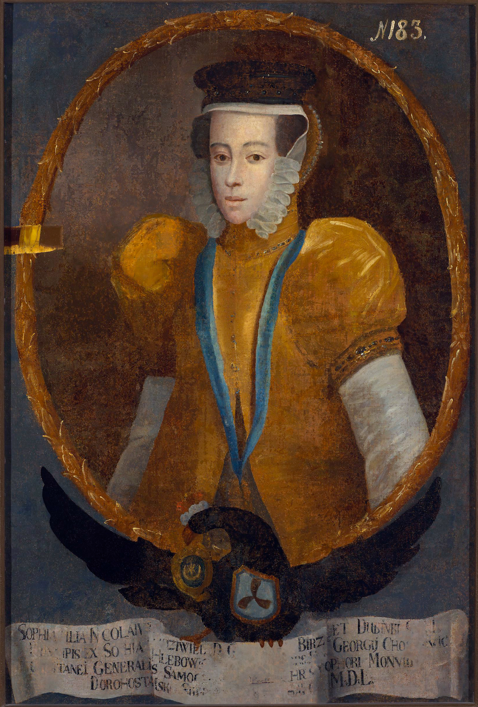 Беларуская (тарашкевіца): Партрэт Соф’і з князёў Радзівілаў: 1. Хадкевіч (Chadkievič), 2. Дарагастайскай (Darahastajskaja)